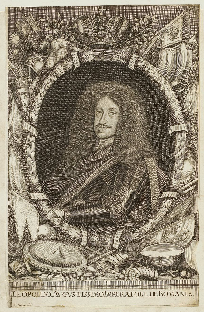 Grafik aus dem Klebeband Nr. 1 der Fürstlich Waldeckschen Hofbibliothek Arolsen Motiv: Kaiser Leopold I.